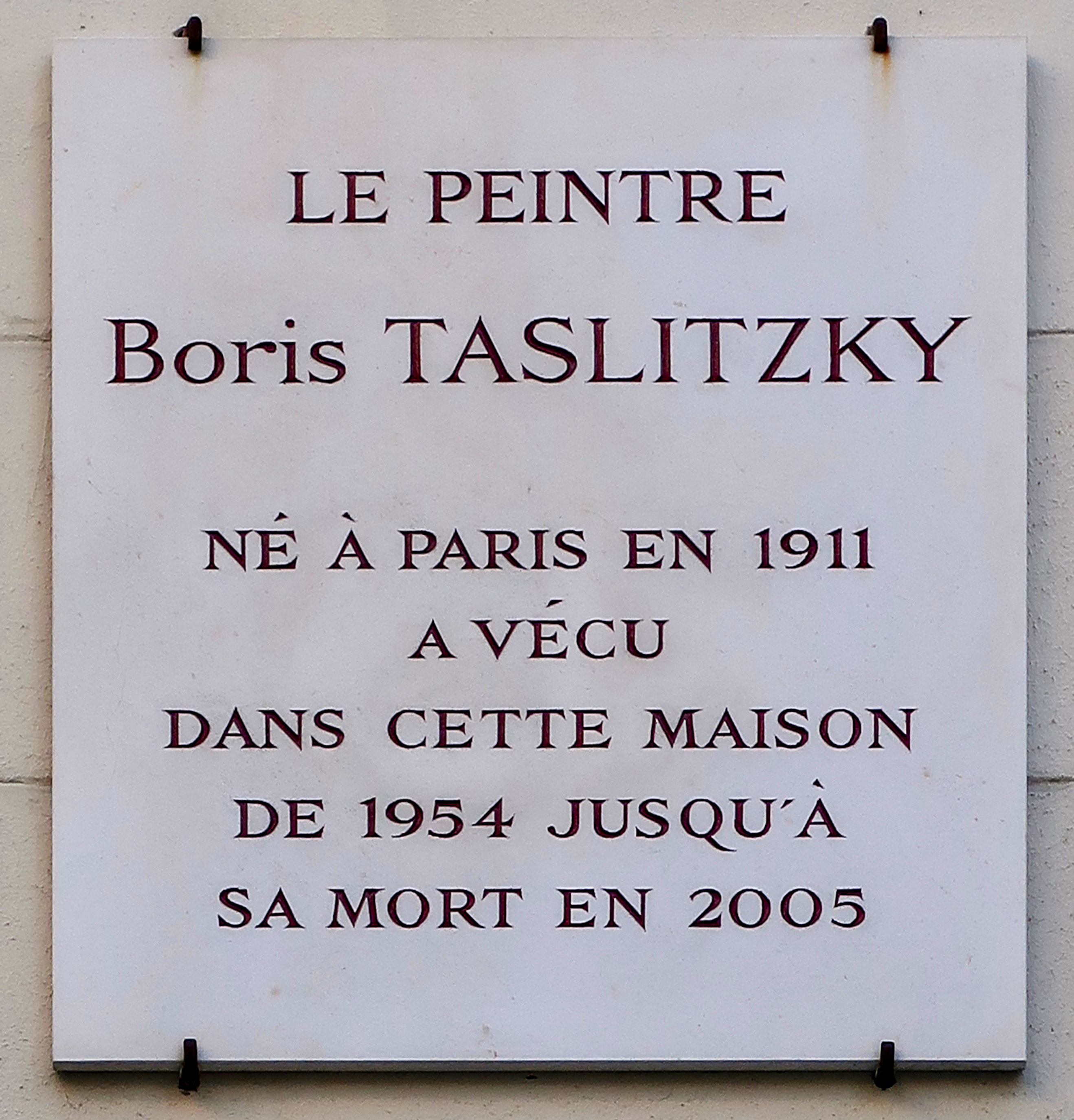 Plaque en hommage au peintre Boris Taslitzky, 5 rue Racine (Paris, 6e).